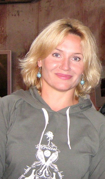 Lucyna Malec-Mayer (ur. 27 lipca 1966 w Bielsku-Białej) – polska aktorka teatralna, filmowa i telewizyjna